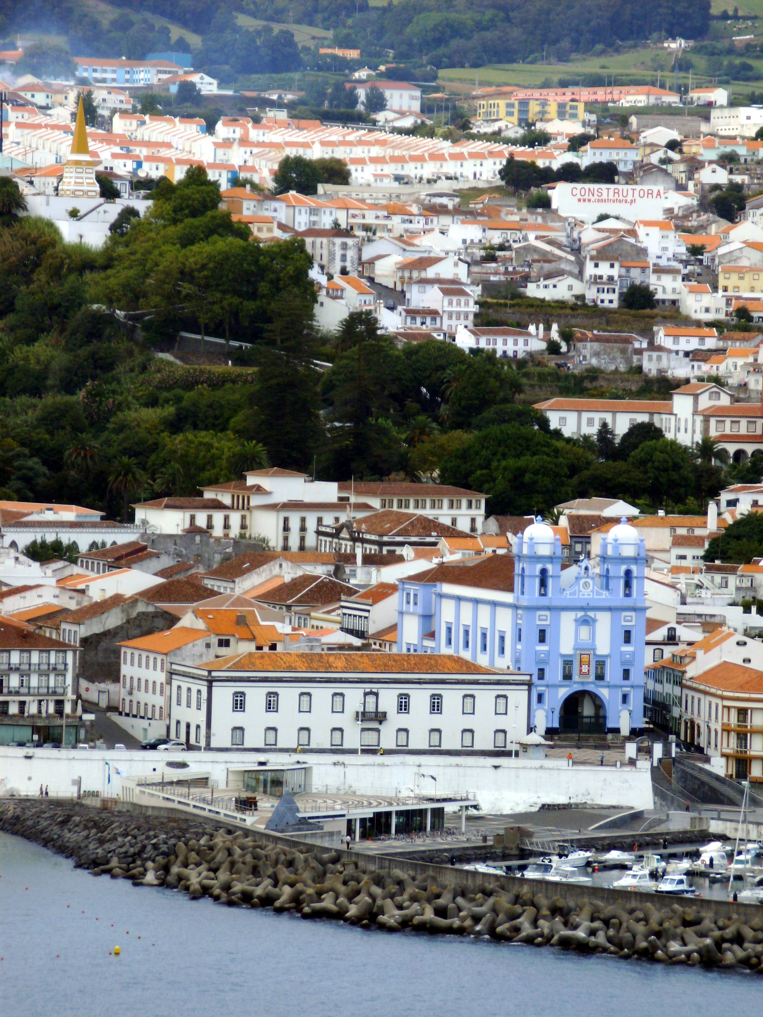 Angra do Heroísmo, Ilha Terceira, Açores: vista do centro histórico. Em primeiro plano a baía de Angra e seu porto; no canto superior esquerdo o Obelisco, monumento em memória de D. Pedro IV de Portugal, onde se erguia o chamado "Castelo de São Luís".